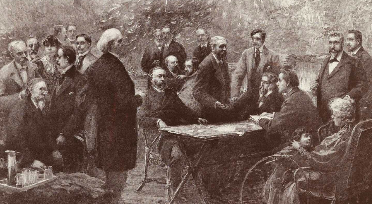 Les poètes du ParnasseTableau de Paul Chabas, « Chez Alphonse Lemerre, à Ville d’Avray », Salon de 1895 Le jardin de l’ancienne propriété du père de Camille Corot, rachetée par l’éditeur parisien Alphonse Lemerre, sert ici de toile de fond au peintre Paul Chabas pour immortaliser les poètes du Parnasse. Aux côtés de Paul Bourget, on remarque François Coppée, Leconte de Lisle, Marcel Prévost, Auguste Dorchain, Léon Dierx, Henri Cazalis, Alphonse Daudet, Sully-Prudhomme, Jules Breton, Paul Arène, André Theuriet, Jules Claretie, José-Maria de Heredia, Paul Hervieu, Henry Roujon, Georges Lafenestre, Alphonse Lemerre.